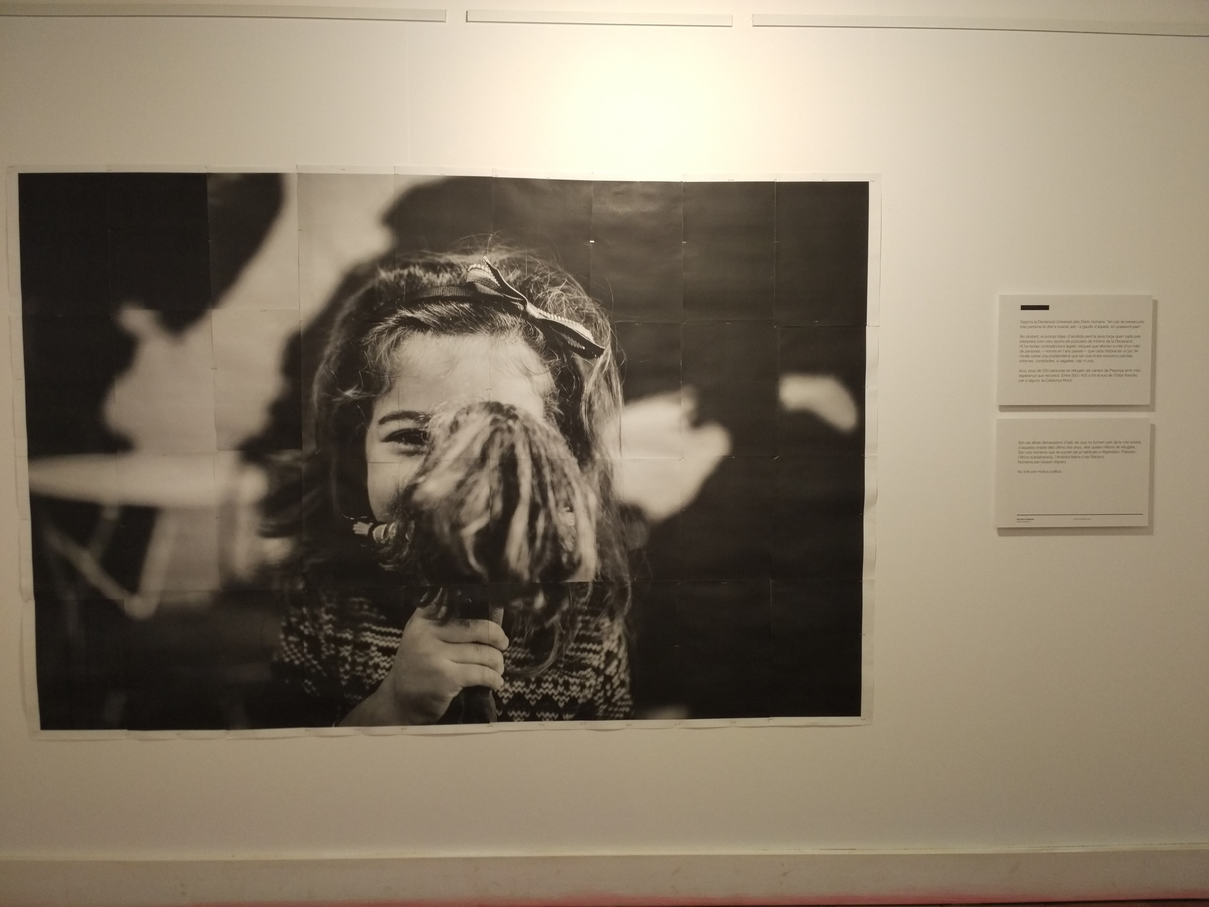 Museu de la Mediterrània, Exposició Carlos Palacios La felicitat inconscient